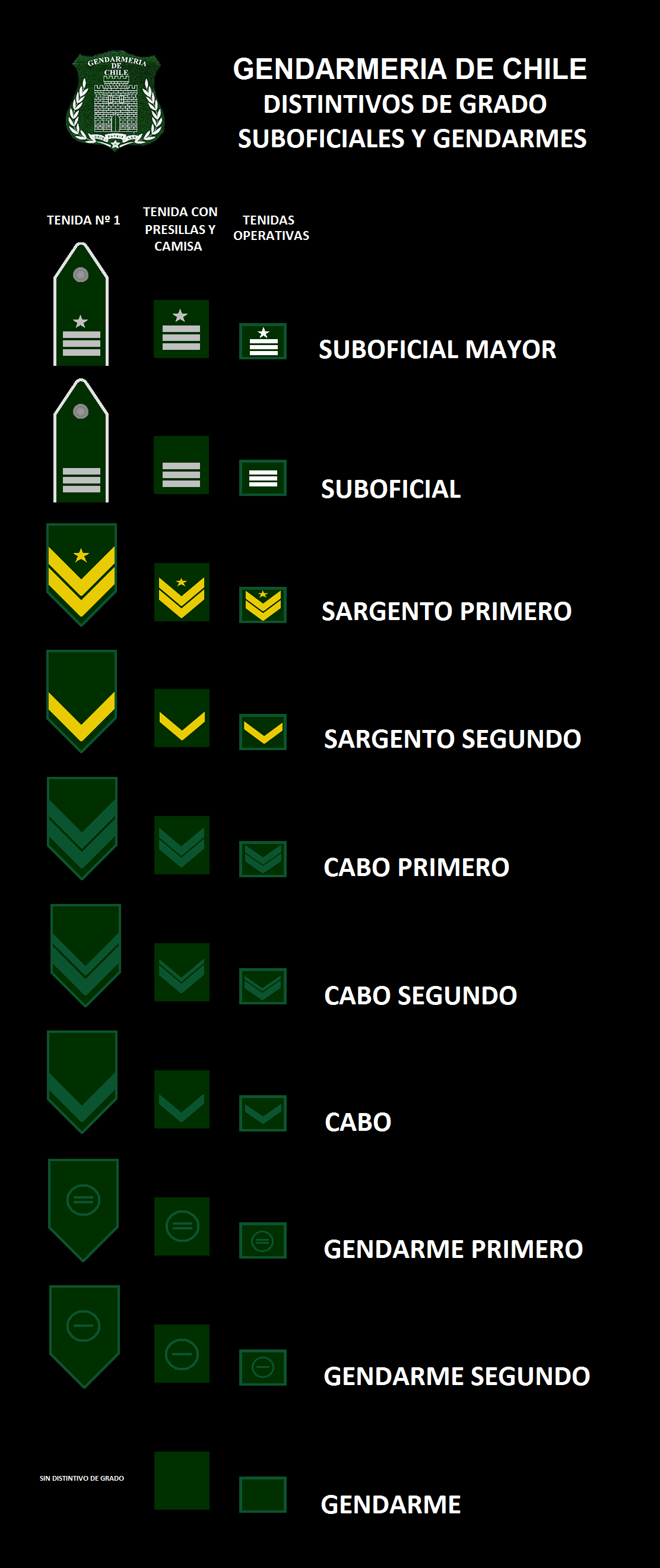 Distintivos de Grados Suboficiales GENCHI